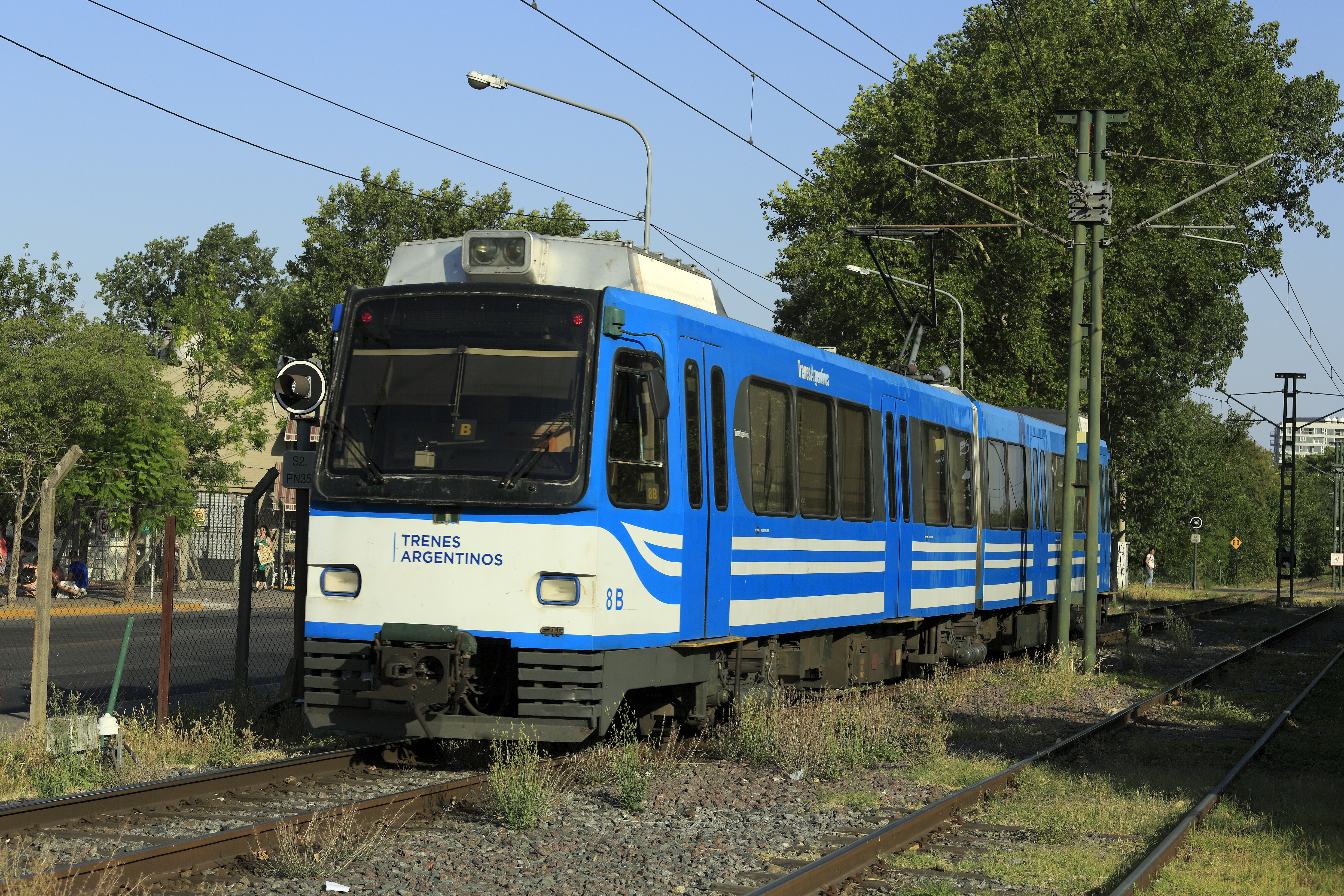 Zug nach Maipú vom Wegübergang Calle Salta, Nachschuss. Die Triebwagen sind ein bis auf Einstiegshöhe und Spurweite kaum veränderter Nachbau der FGV-Reihe 3700 der Metro Valencia